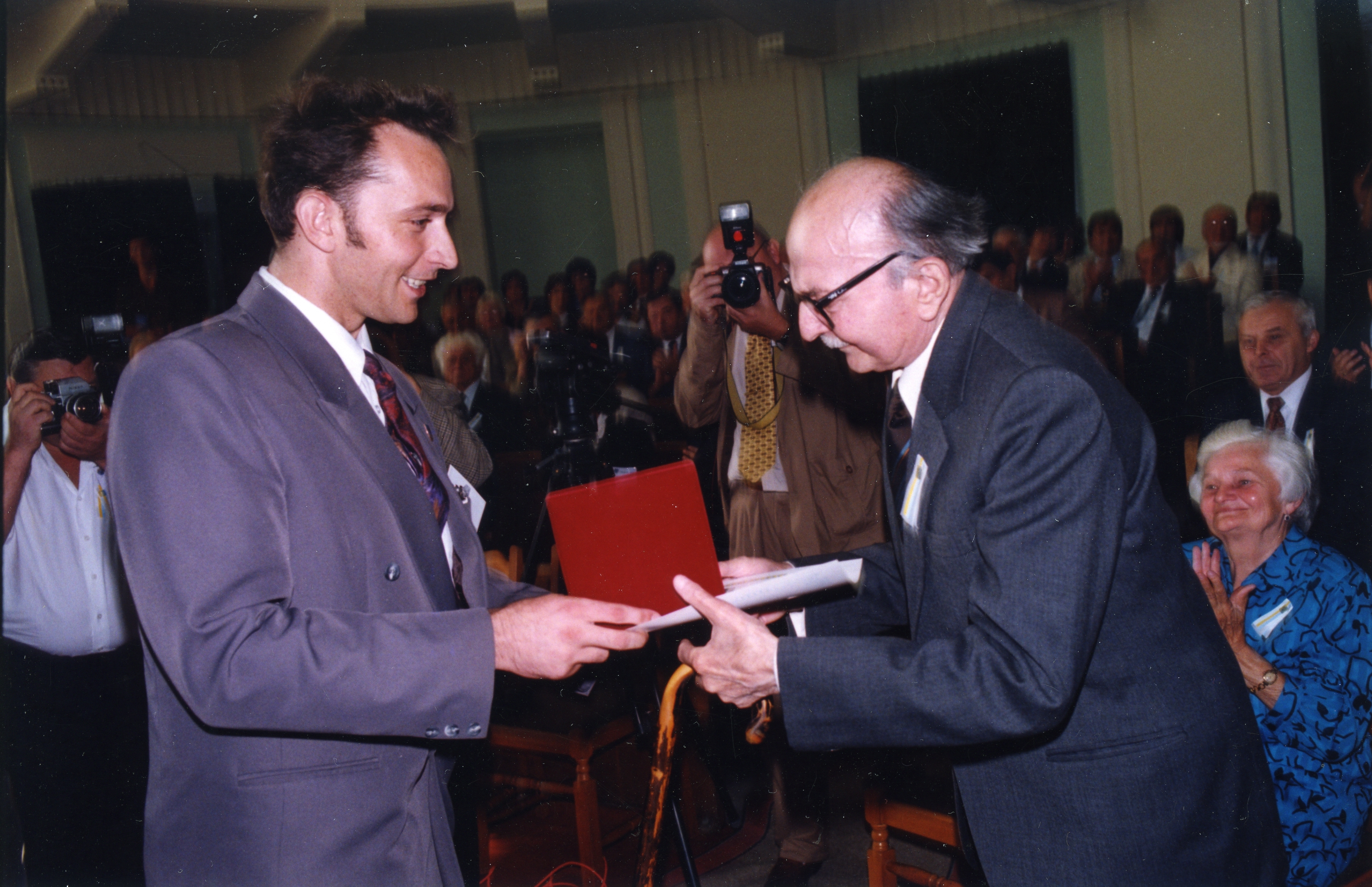 Ištvan Seli (mađ. Szeli István; 1921 — 2012) istoričar književnosti, profesor na Filozofskom fakultetu u Novom Sadu i redovni član SANU.. prima nagradu zaslužnih građana grada Sente, 1997. foto:Stevan Kragujević (po odobrenju kćerke Tanje Kragujević